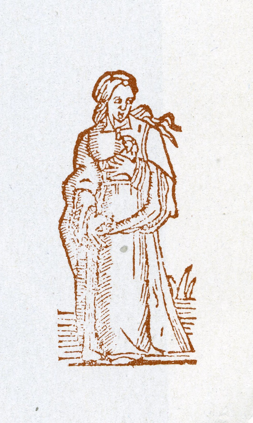 a comadre